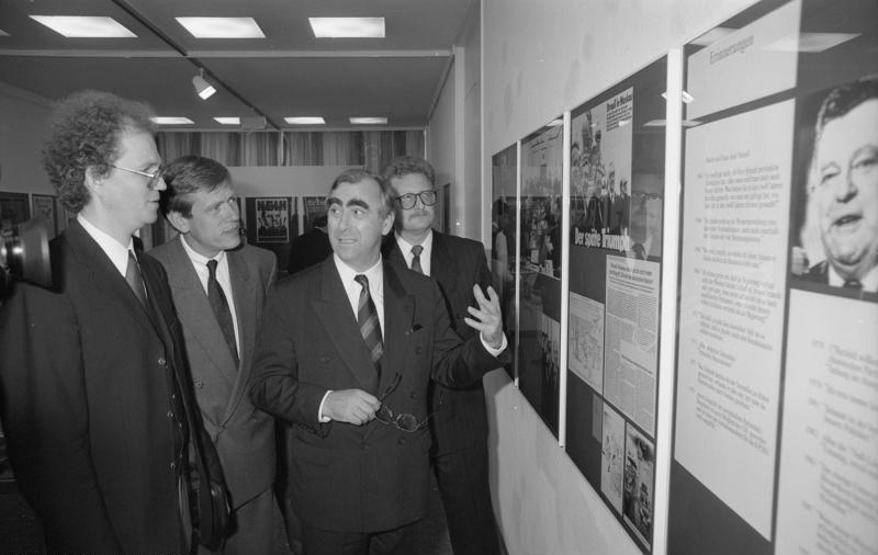 10. Oktober 1990 Die bayerische Landesvertretung in Bonn eröffnete am 10. Oktober 1990 aus Anlaß des 2. Todestages (3. Oktober 1988) von Franz Josef Strauß eine Ausstellung, die mit Fotos und Exponaten das politische Leben von Franz Josef Strauß würdigen. Diese Ausstellung fand statt unter Mitwirkung der Bildstelle des Presse- und Informationsamtes der Bundesregierung und des Archivs für Christlich-Soziale Politik der Hanns-Seidel-Stiftung e.V.